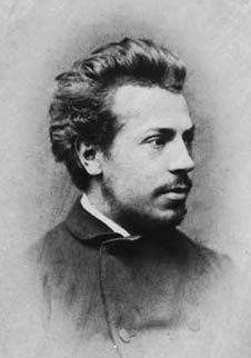 Henrik Pontoppidan, Nobel Prize for Literature 1917